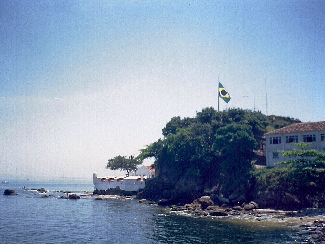 Forte de São Domingos de Gragoatá, Niterói, RJ, Brasil: vista panorâmica.